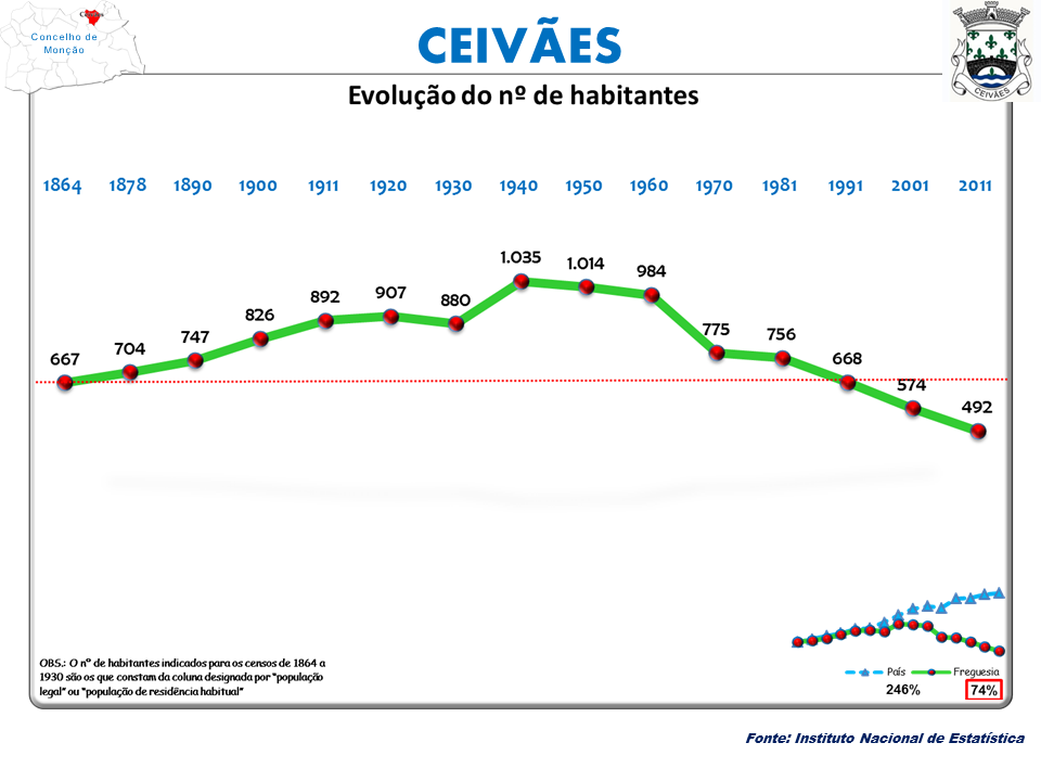 Censos 1864/2011